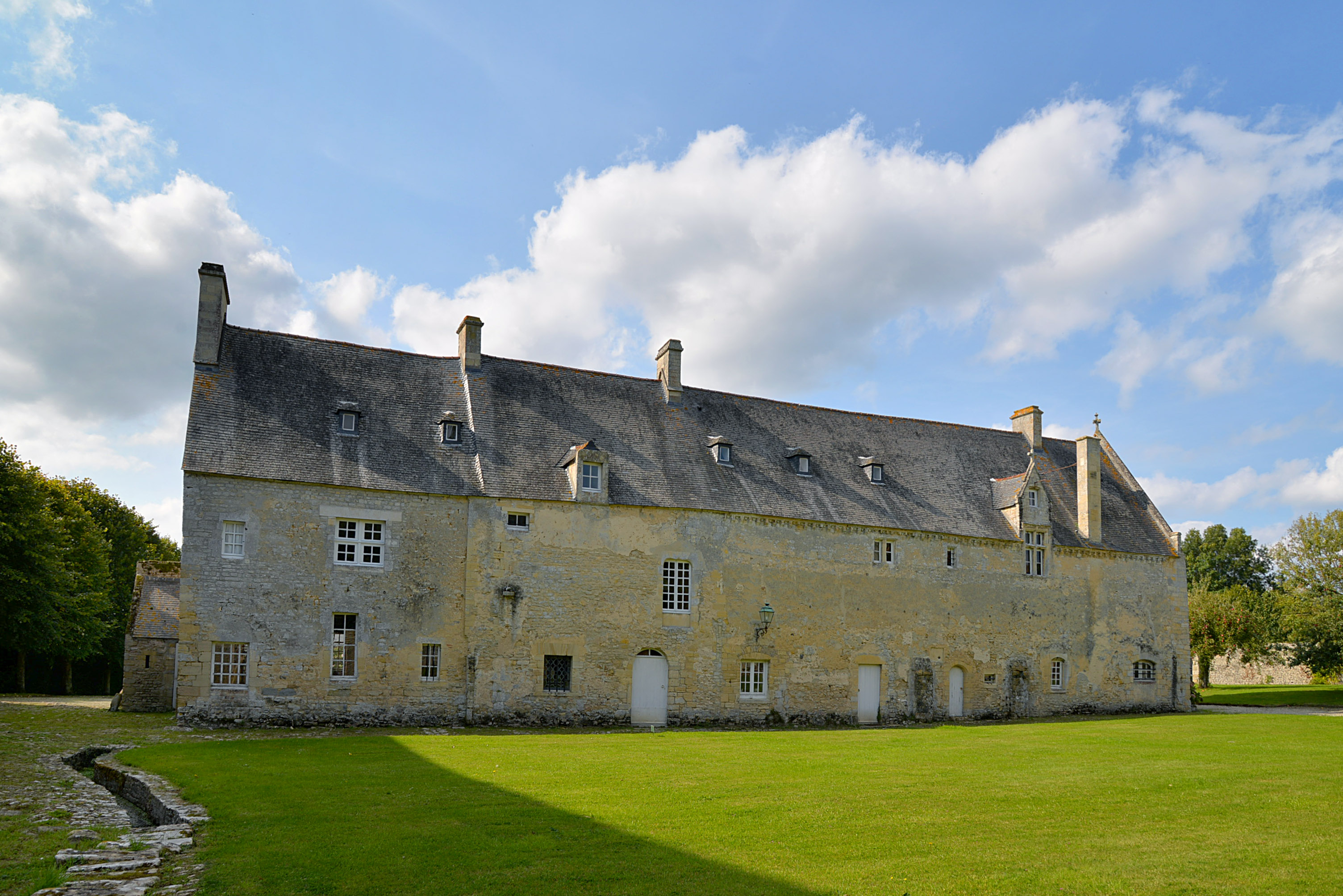 Longues-sur-Mer (Calvados)